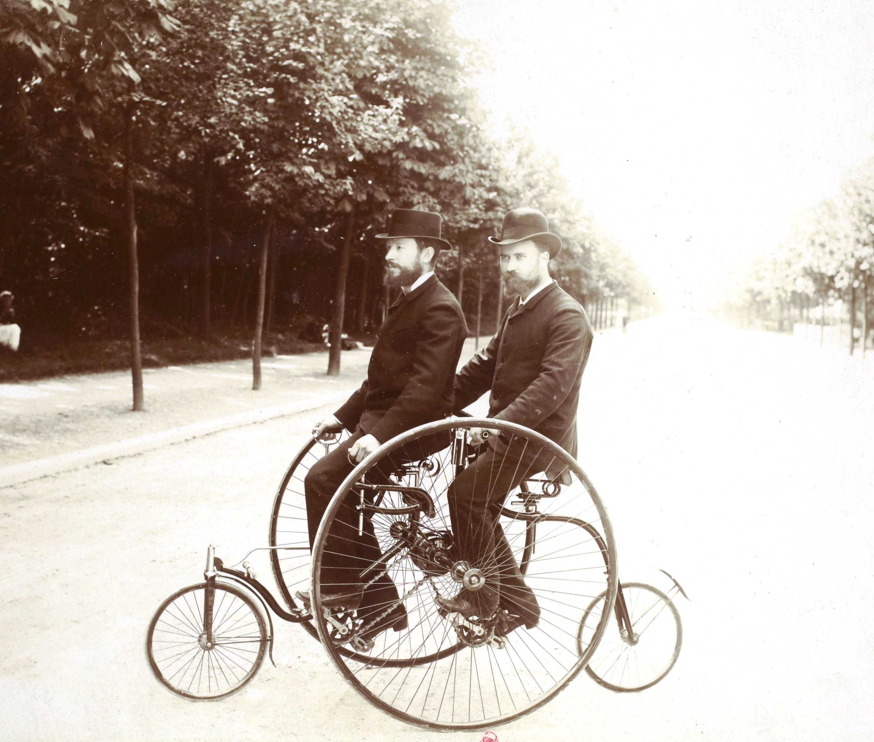 [Collection Jules Beau. Photographie sportive] : T. 1. Années 1894 et 1895 / Jules Beau : F. 13. Adolphe Clément